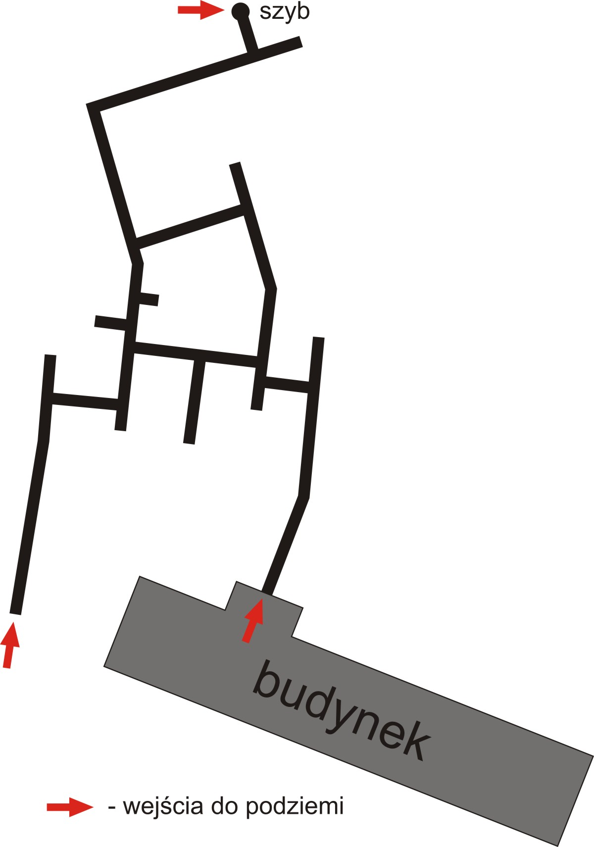 Plan podziemi nad Jeziorem Szmaragdowym w Szczecinie